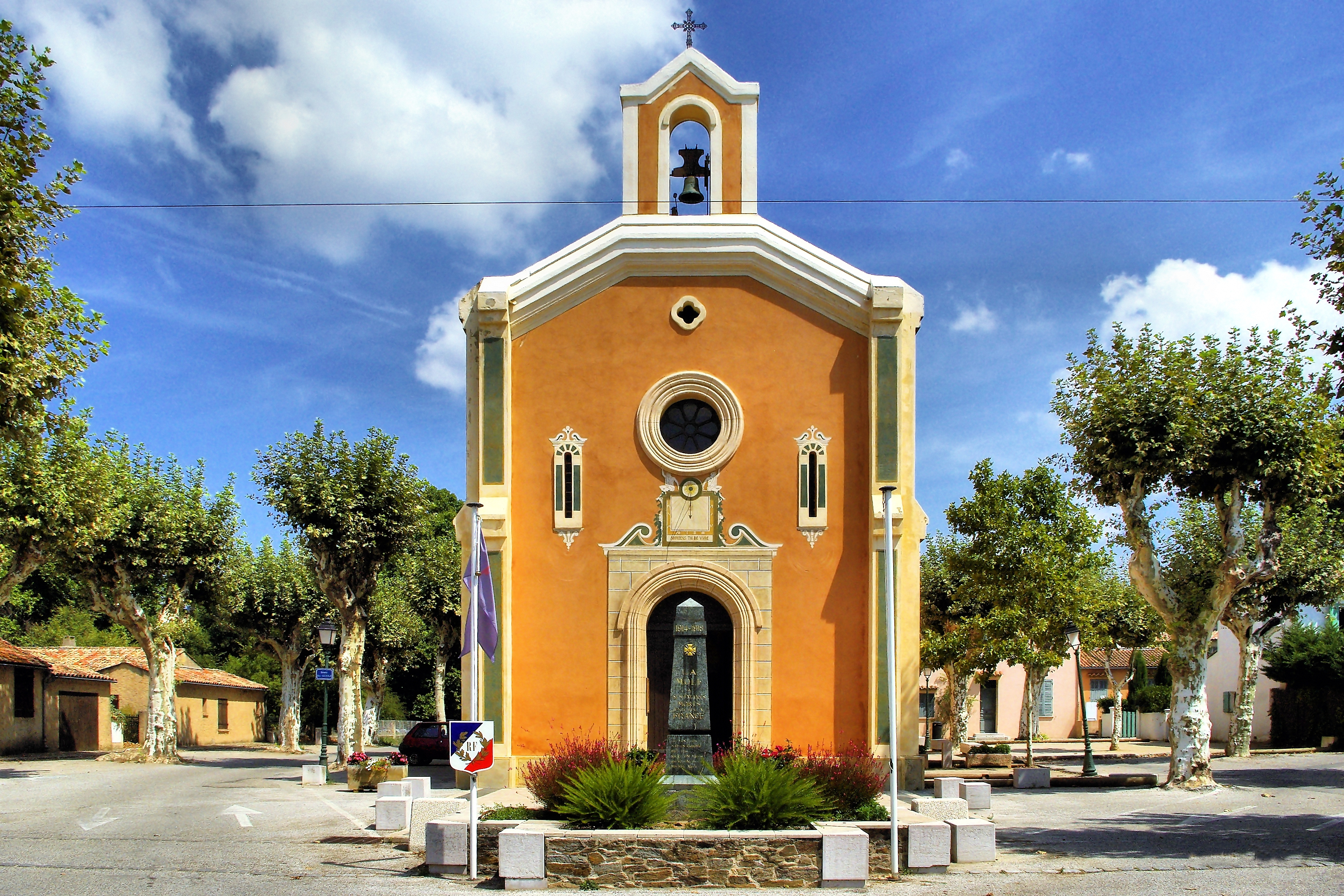 Eglise Sainte Marie-Madeleine